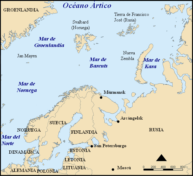 Situación del Mar de Barents. Mapa del mar de Barents en español. Barents sea map in Spanish.